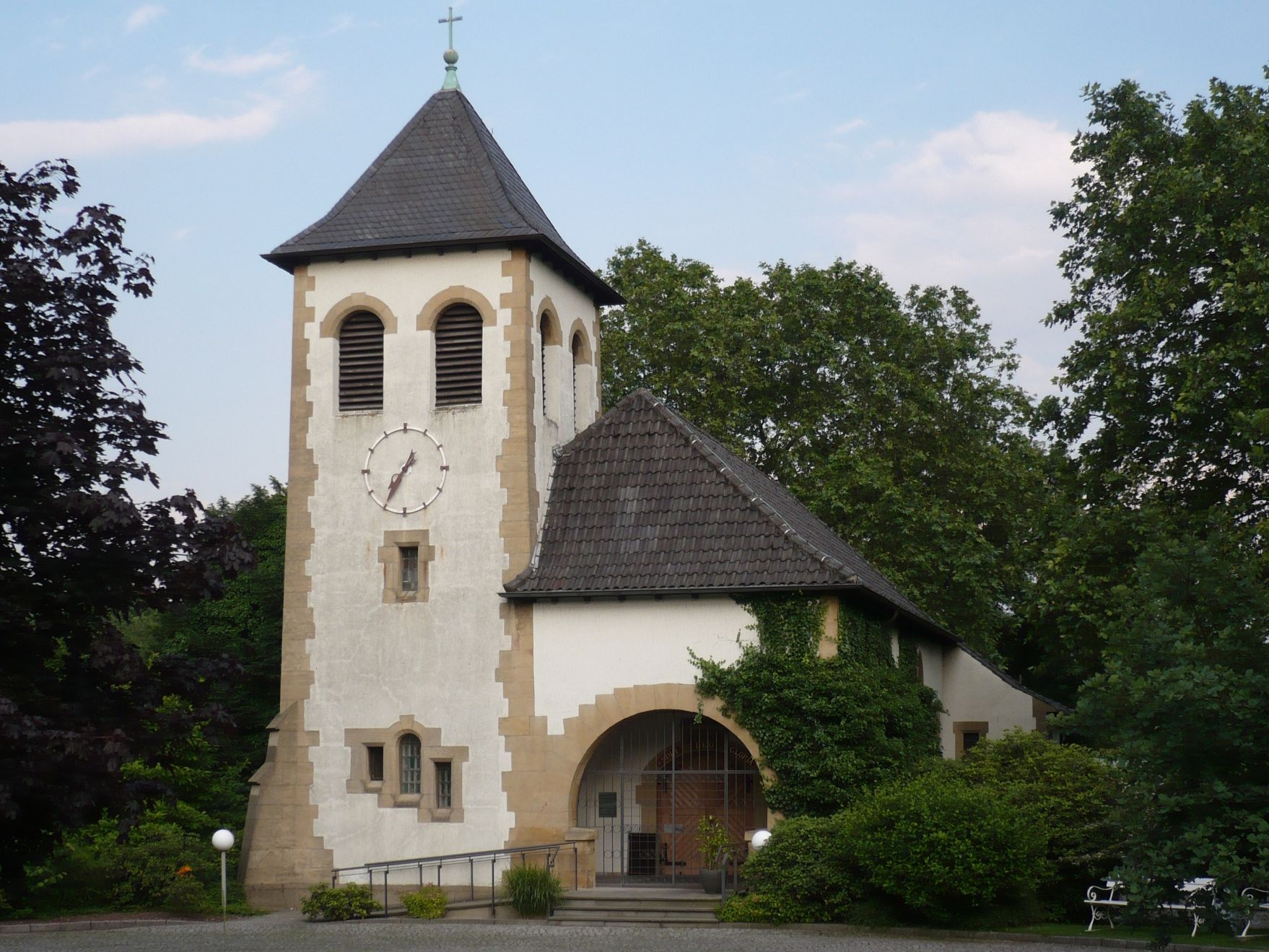 Kapelle des Altenhofes in Essen-Rüttenscheid, heute Krankenhauskapelle des Alfried-Krupp-Krankenhauses